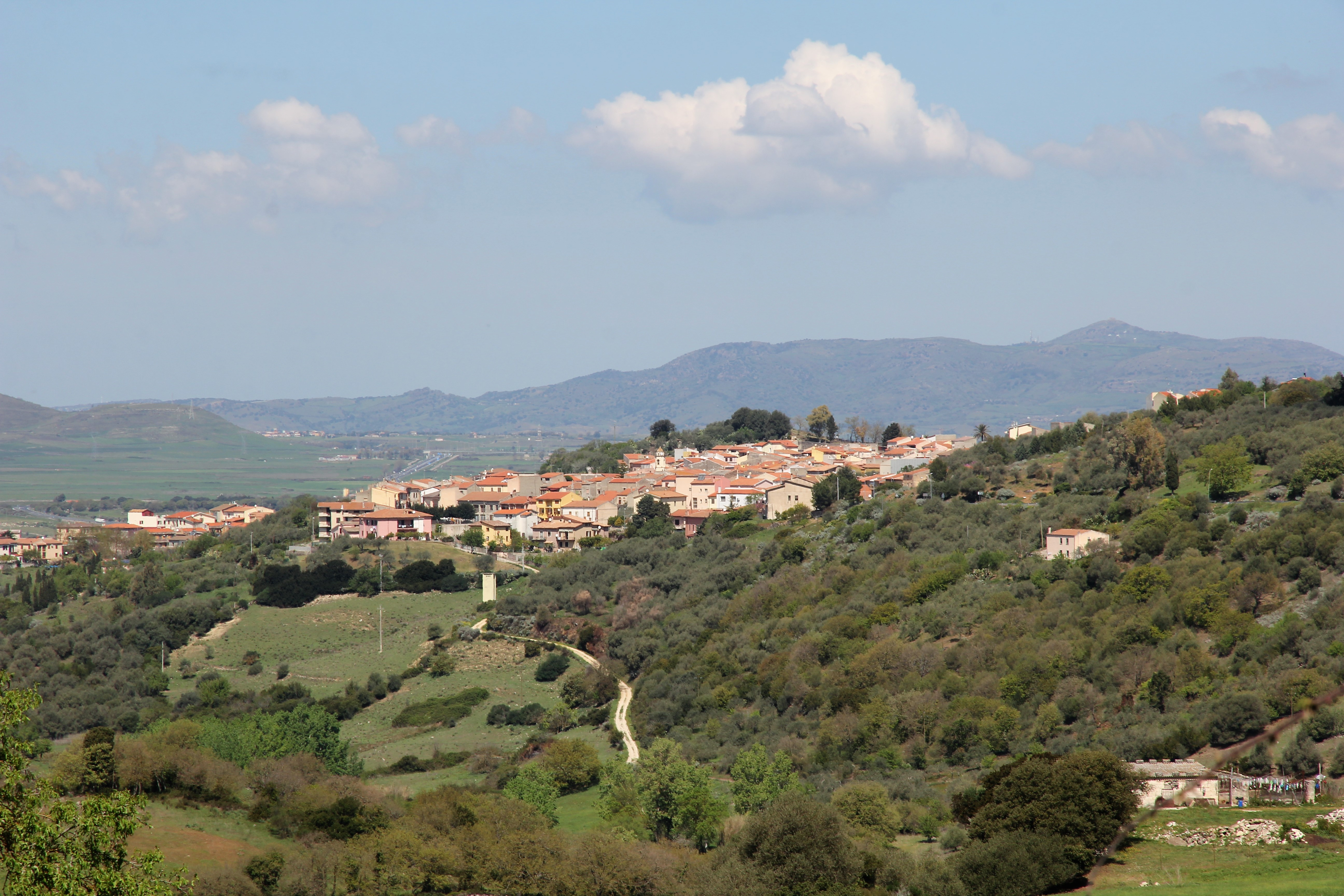 Siligo, panorama